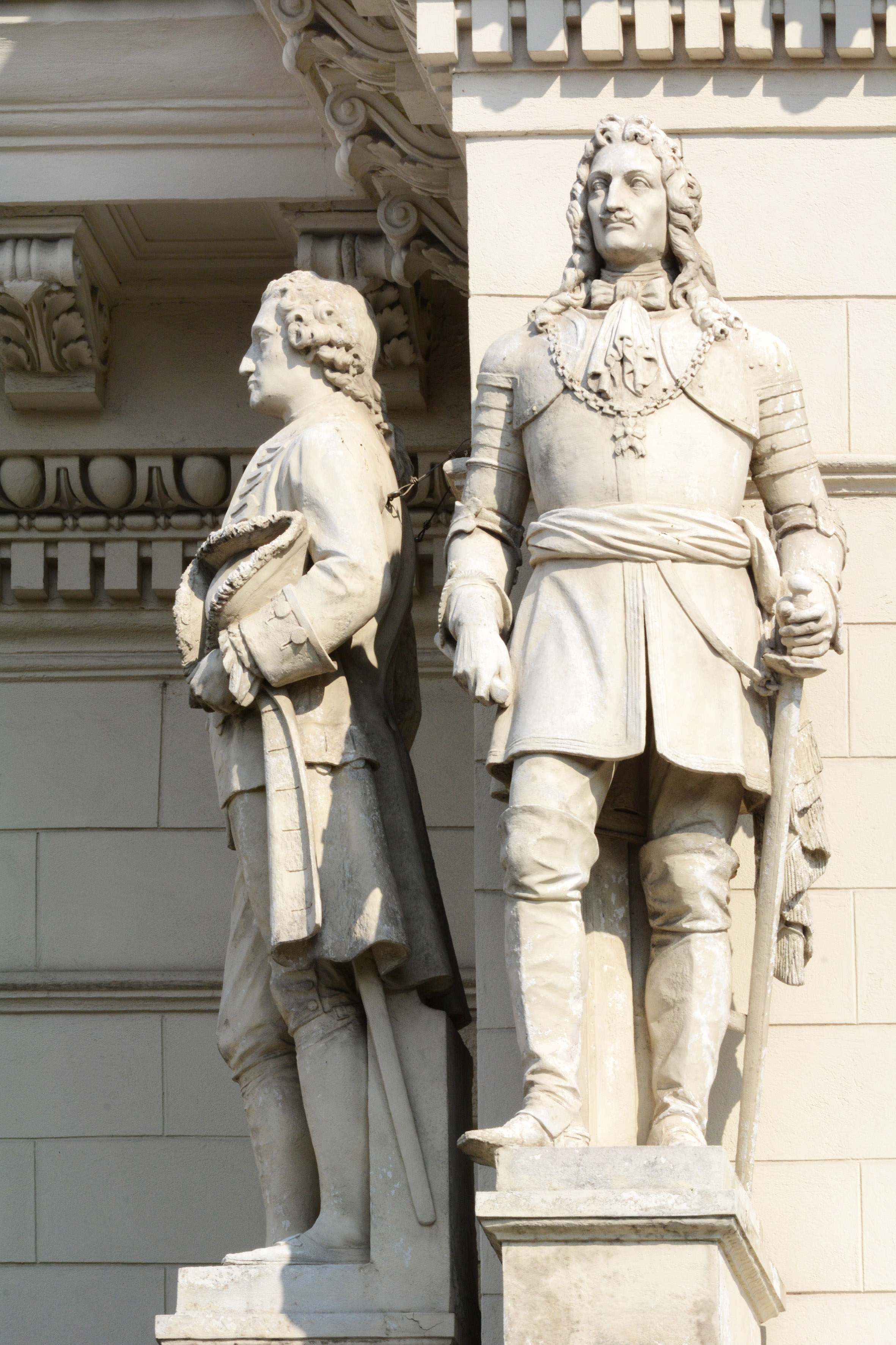 links:Joseph Freiherr von Sonnenfels (* 1732/1733 - †25. April 1817) österreichischer Schriftsteller, Verwaltungsreformer und Professor der Politischen Wissenschaften. Graf Ernst Rüdiger von Starhemberg (* 12. Jänner 1638 in Graz; † 4. Jänner 1701 in Vösendorf bei Wien) war ab 1680 Wiener Stadtkommandant, der Verteidiger Wiens bei der Zweiten Türkenbelagerung 1683. Die überlebensgroßen Statuen über dem Gesims an der Vorderfront des Palais stammen von Josef Gasser und Franz Melnitzky. Erzherzog-Ludwig-Viktor-Palais, Wien 1., Schwarzenbergplatz 1, Stubenring 13.